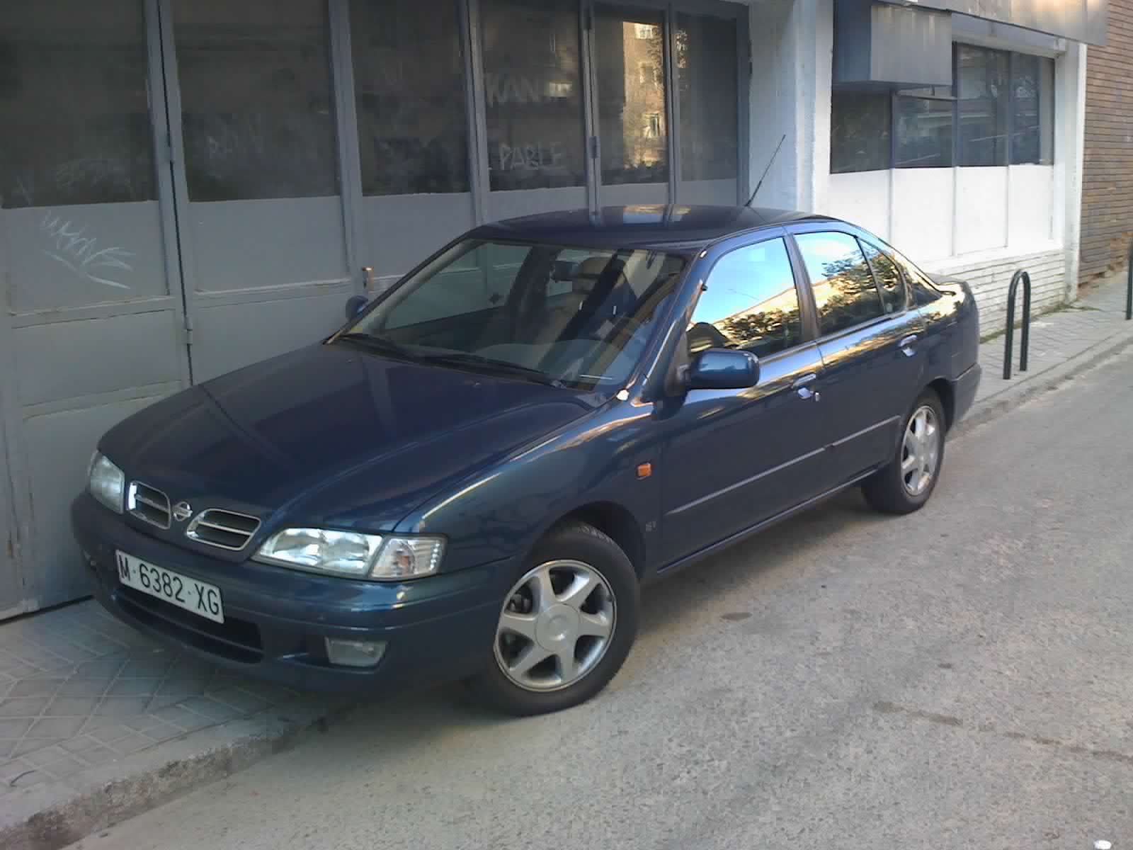 Nissan Primera